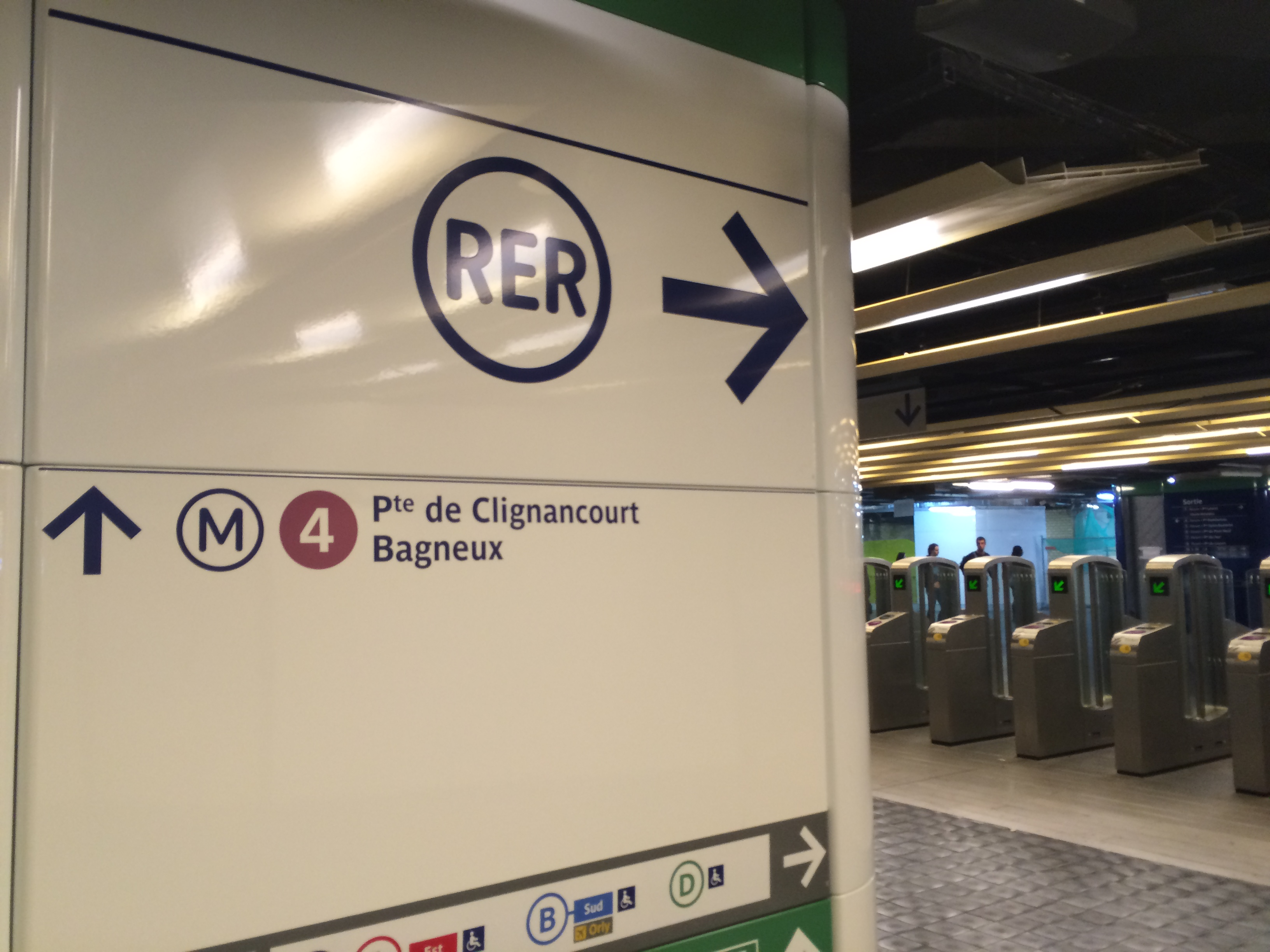 Affichage des directions au pôle d'échanges de Châtelet en juillet 2016. Le terminus Bagneux de la ligne 4 du métro, non encore opérationnel, est déjà affiché.